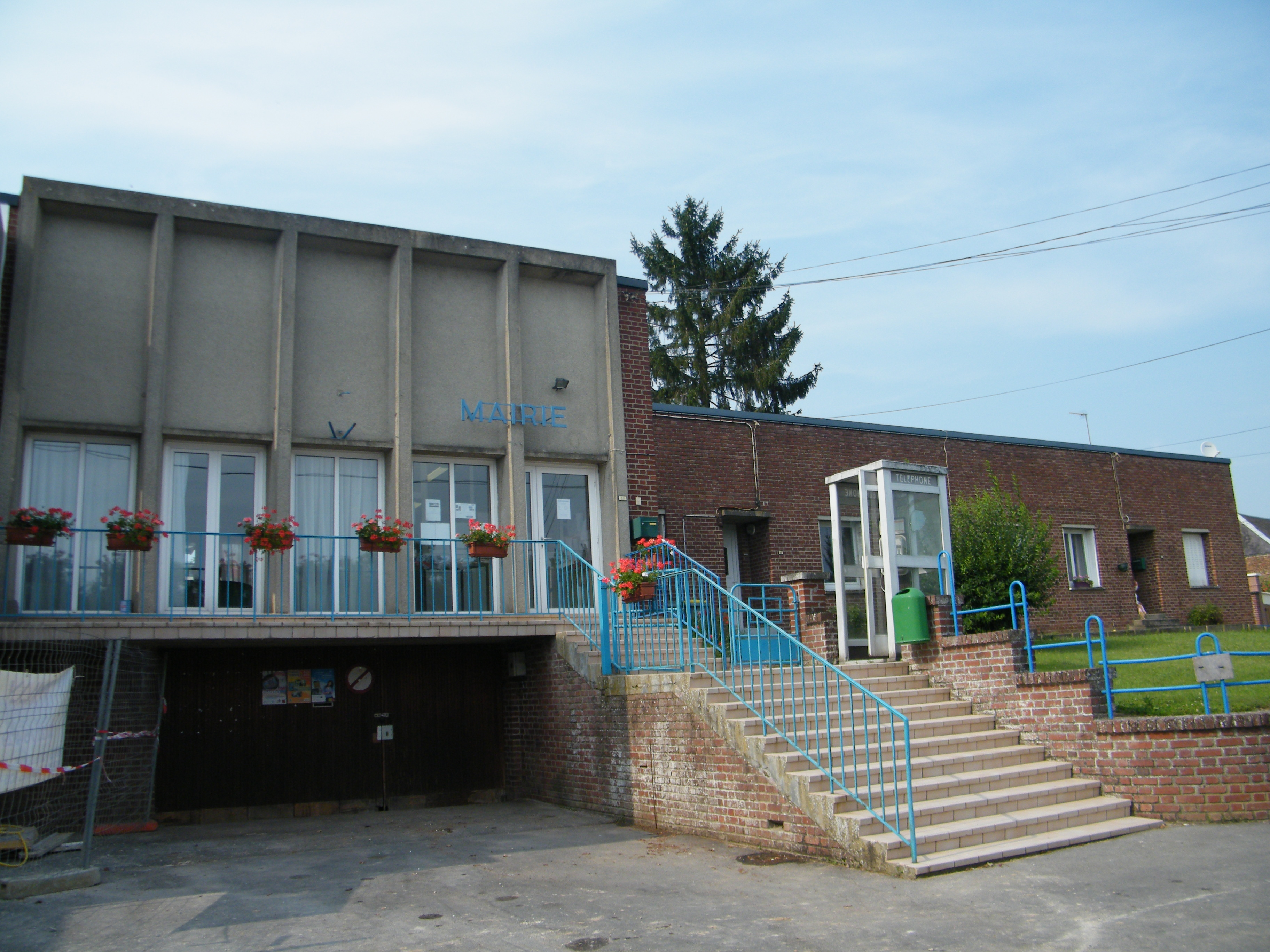 Mairie.